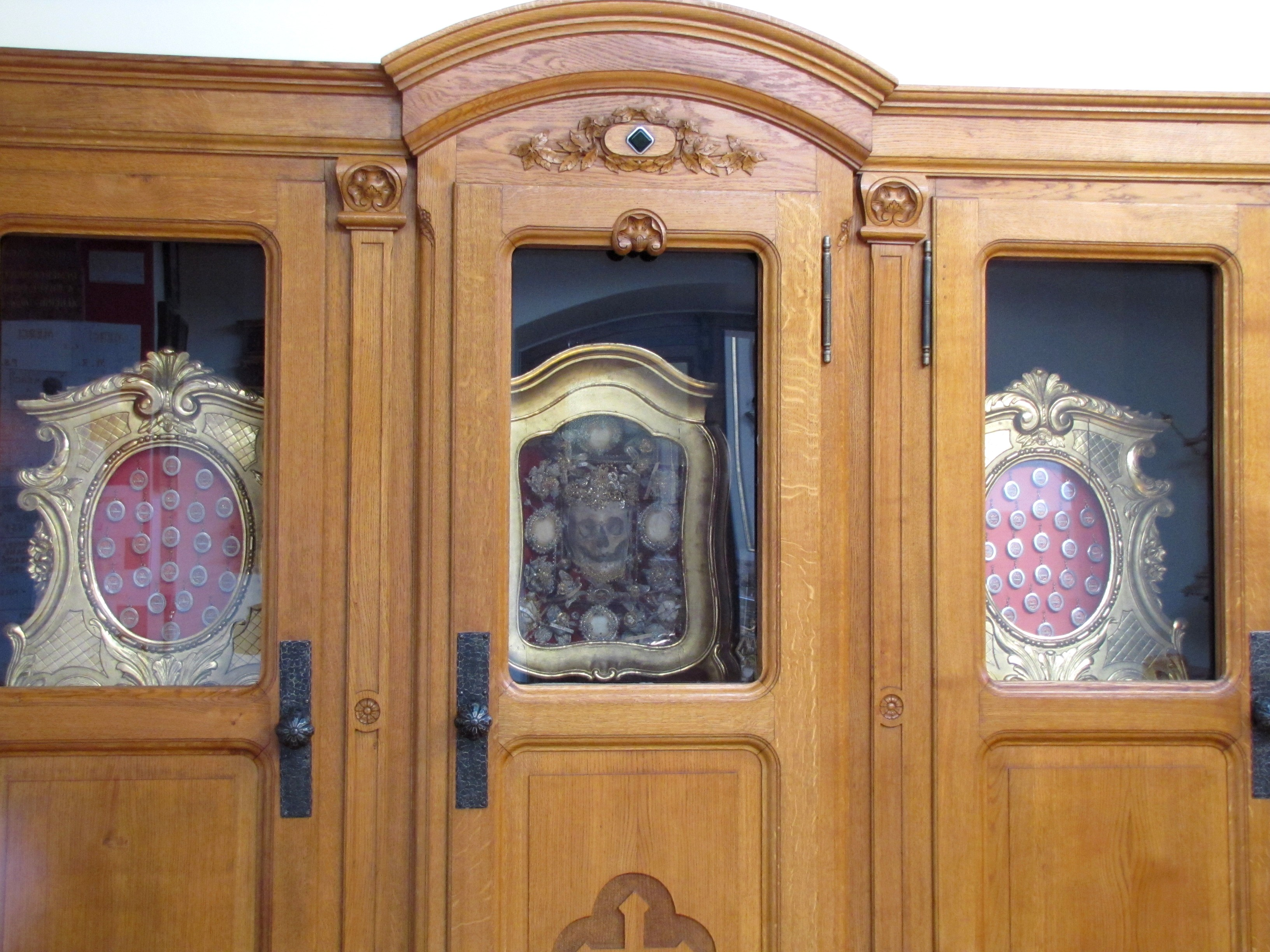 Alsace, Haut-Rhin, Jungholtz, Basilique Notre-Dame (1723) de Thierenbach (PA00085469, IA00111918). Armoires avec reliques (XVIIIe-XIXe): This object is indexed in the base Palissy, database of the French furniture patrimony of the French ministry of culture, under the references IM68003995 and IM68003993.